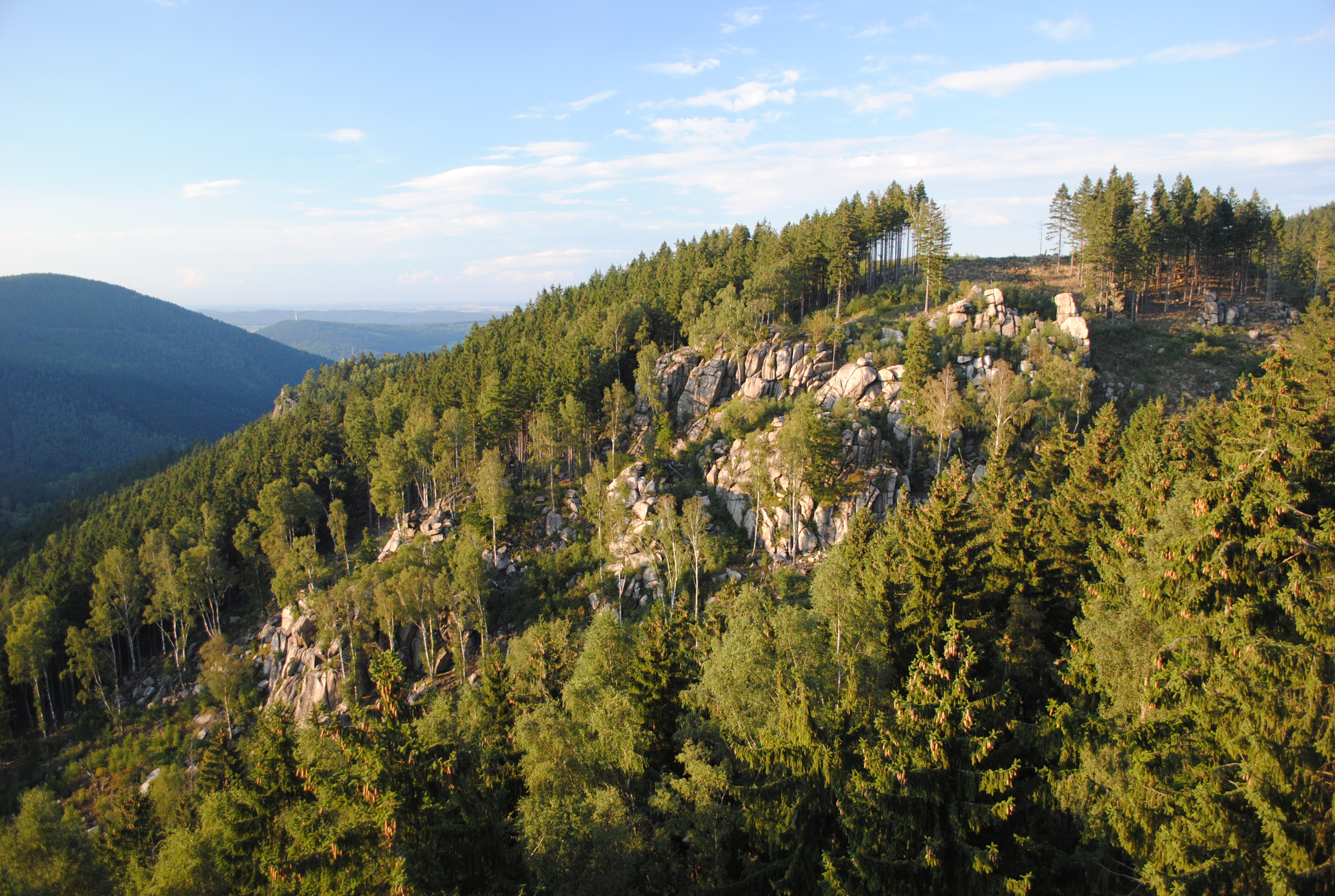 Blick vom Treppenstein nach Nordwesten